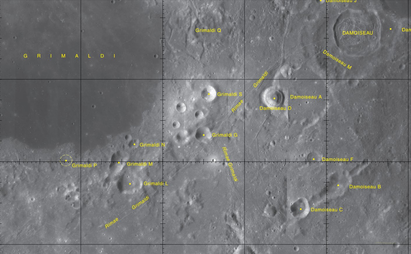 Rimae Grimaldi. Localización (Imagen LRO)